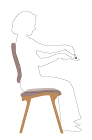 Проекционная схема посадки на стуле с плоским сиденьем.